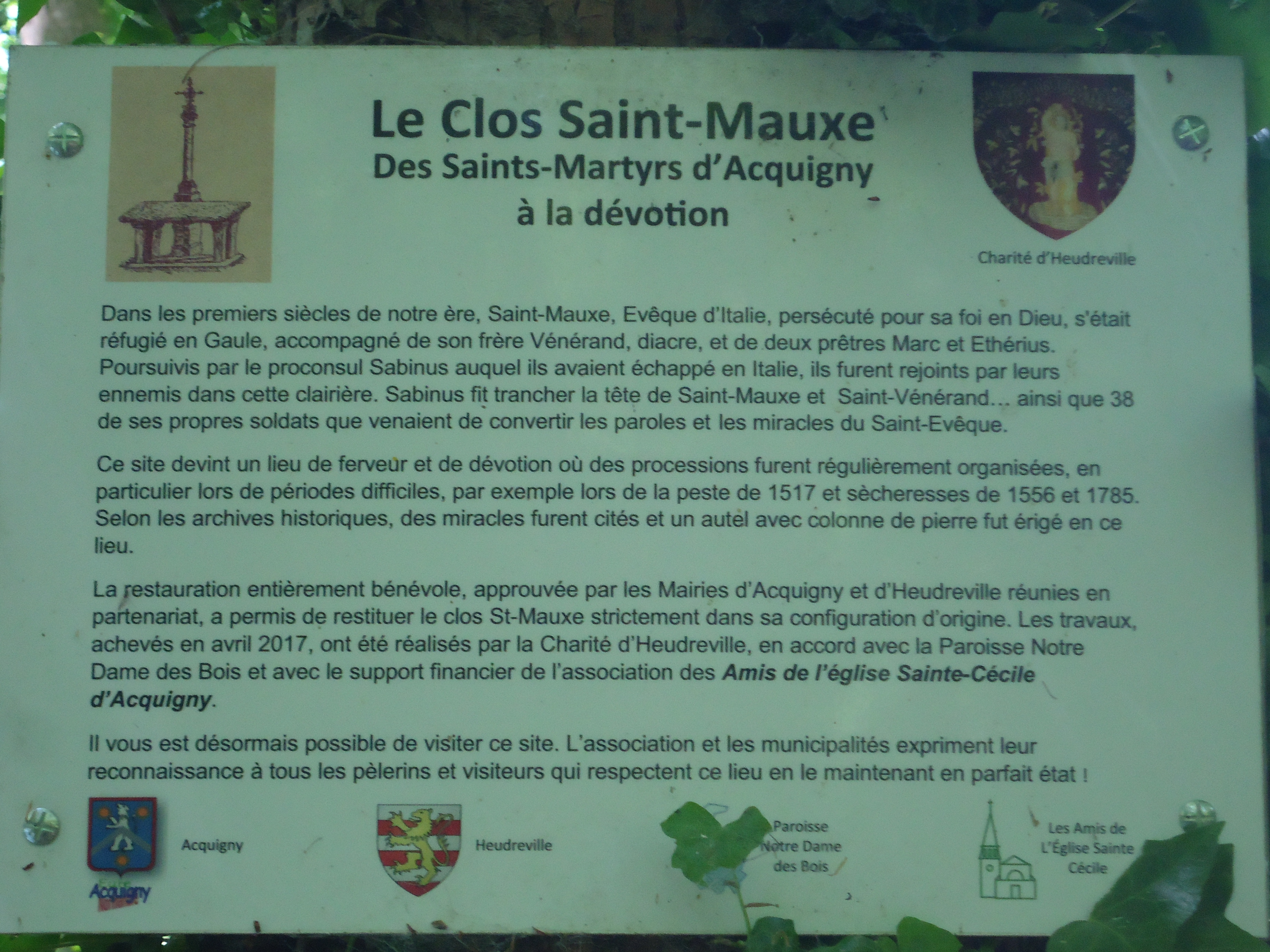 Plaque commémorant la restauration en 2017 de la croix de St Mauxe et St Venerand à Acquigny dans l'Eure